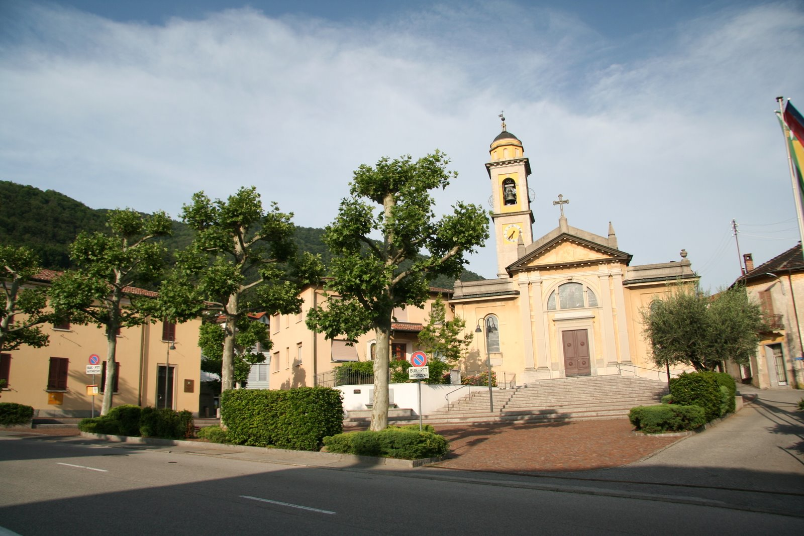 Piazza del municipio di Vacallo